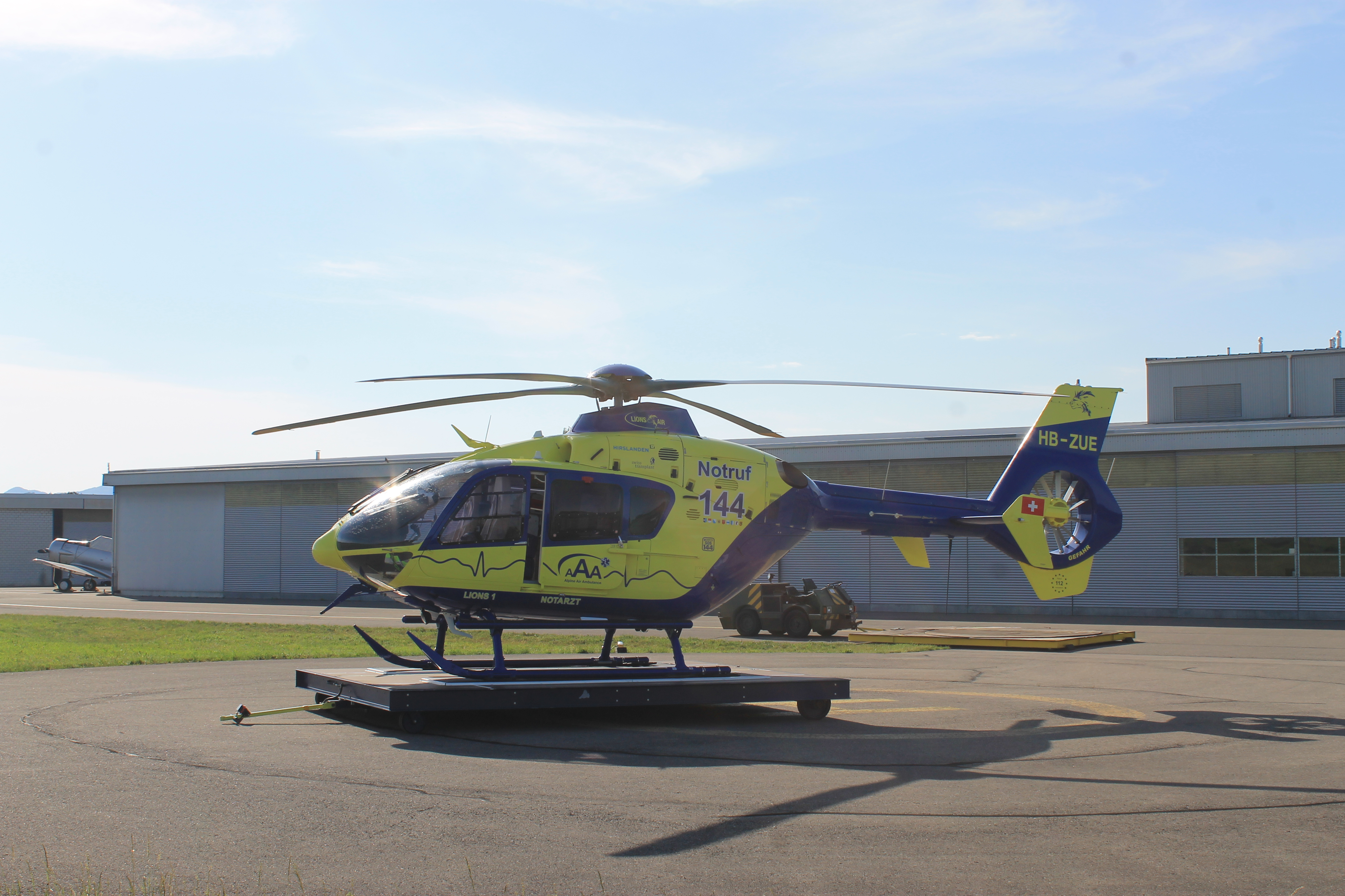 Rettungshubschrauber Lions 1 der AAA Alphine Air Ambulance